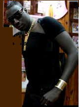 source : photo personelle